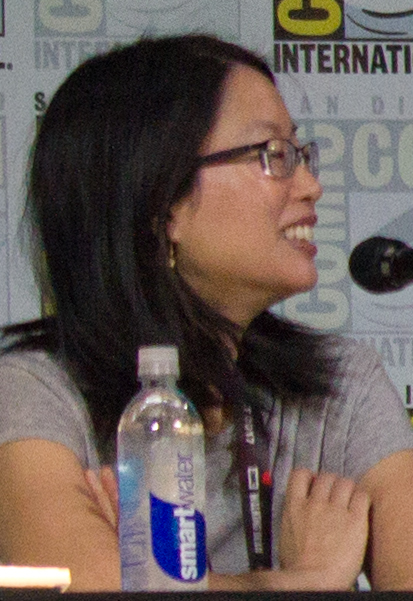 Creators & voice cast panel SDCC 2017